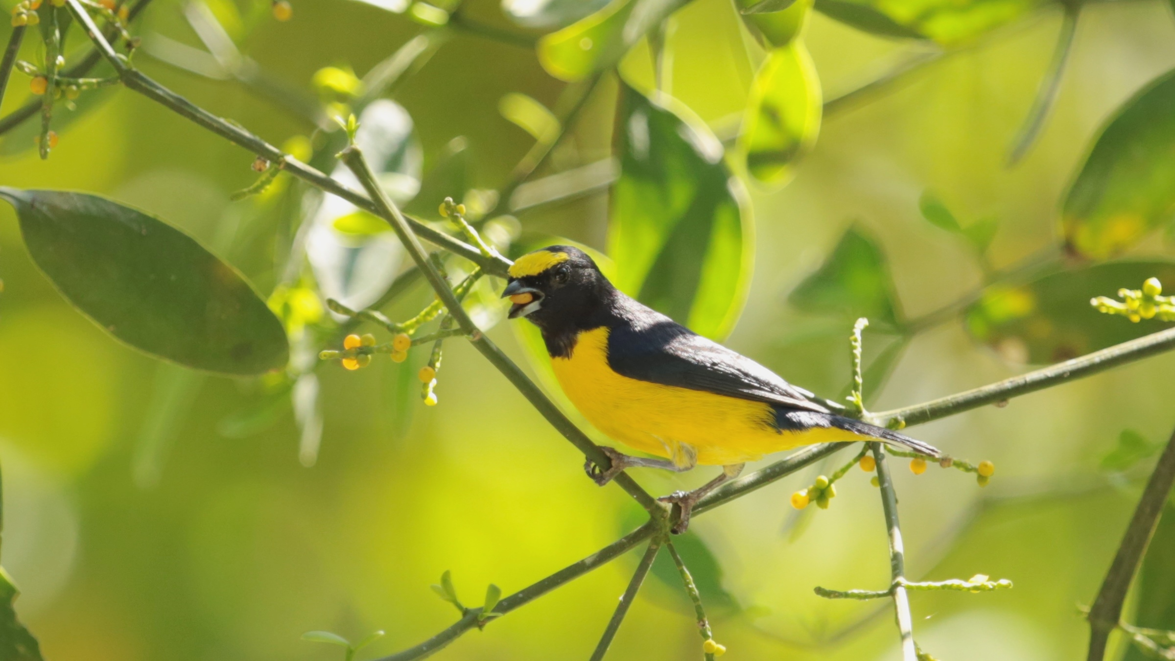 Eufonia Garganta Negra